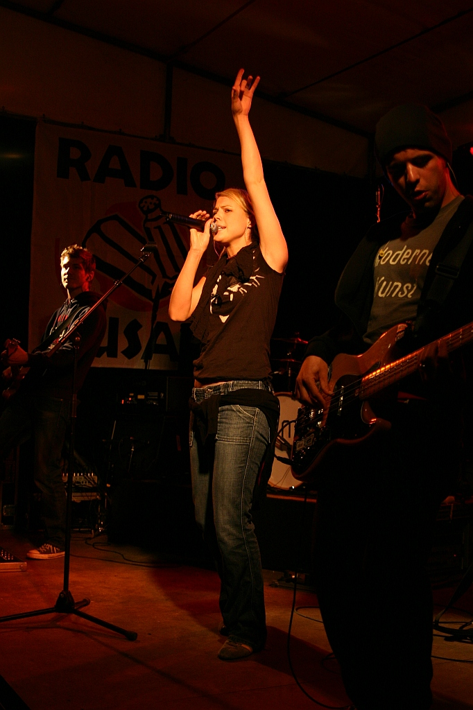 Lunik, a trip-hop band from Switzerland, Concert in Schröders Garten (Lüneburg)